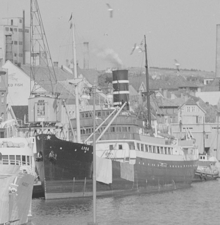 Bildet er hentet fra Nasjonalbibliotekets bildesamling. Anmerkninger til bildet var: Fotograf : ukjent Stavanger,Vågen, Stavanger, RogalandSkipet er Det Bergenske Dampskibsselskabs DS «Lyra» bygd i 1912